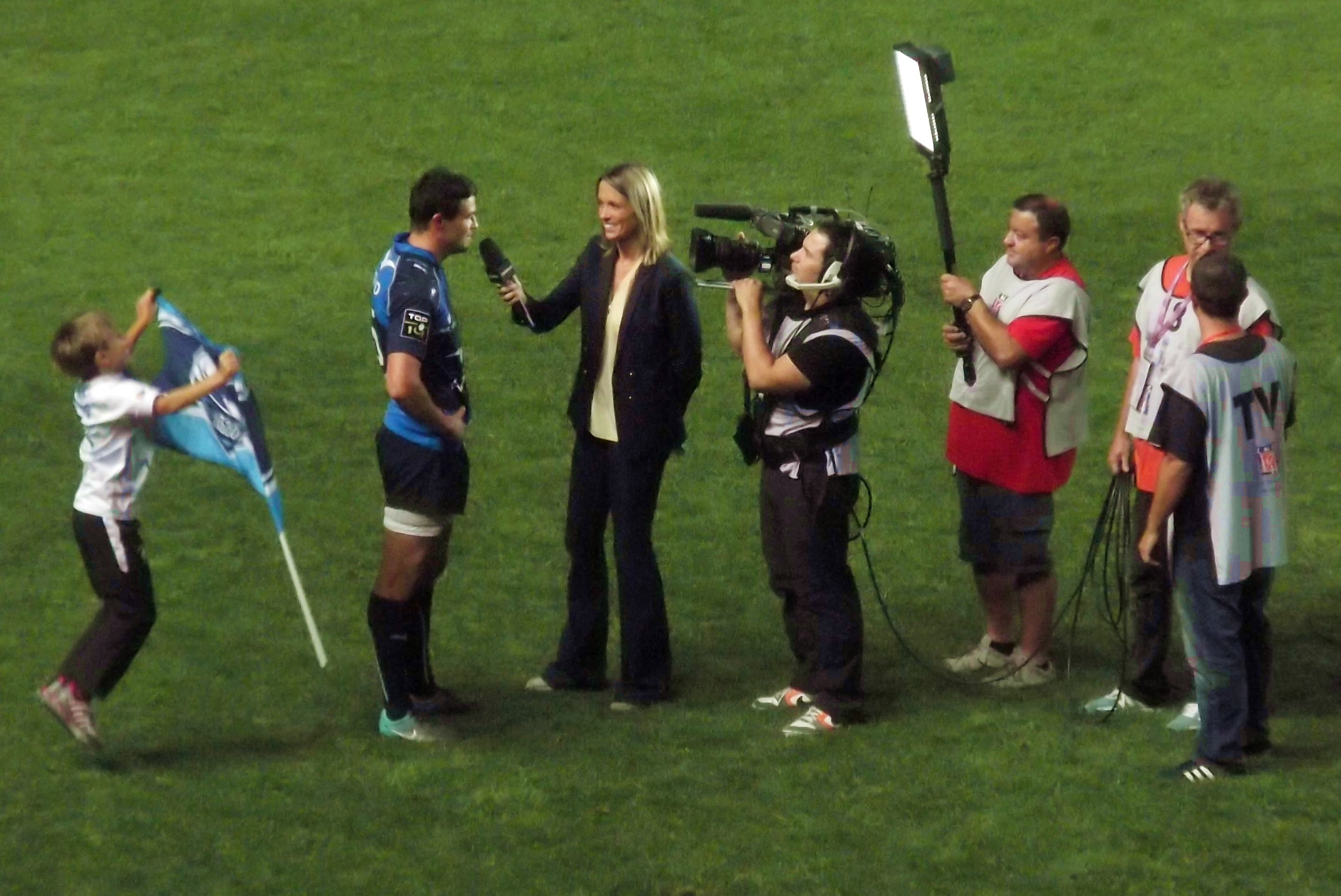 Isabelle Ithurburu interviewe Anthony Floch, MHR-Clermont (20 septembre 2013).